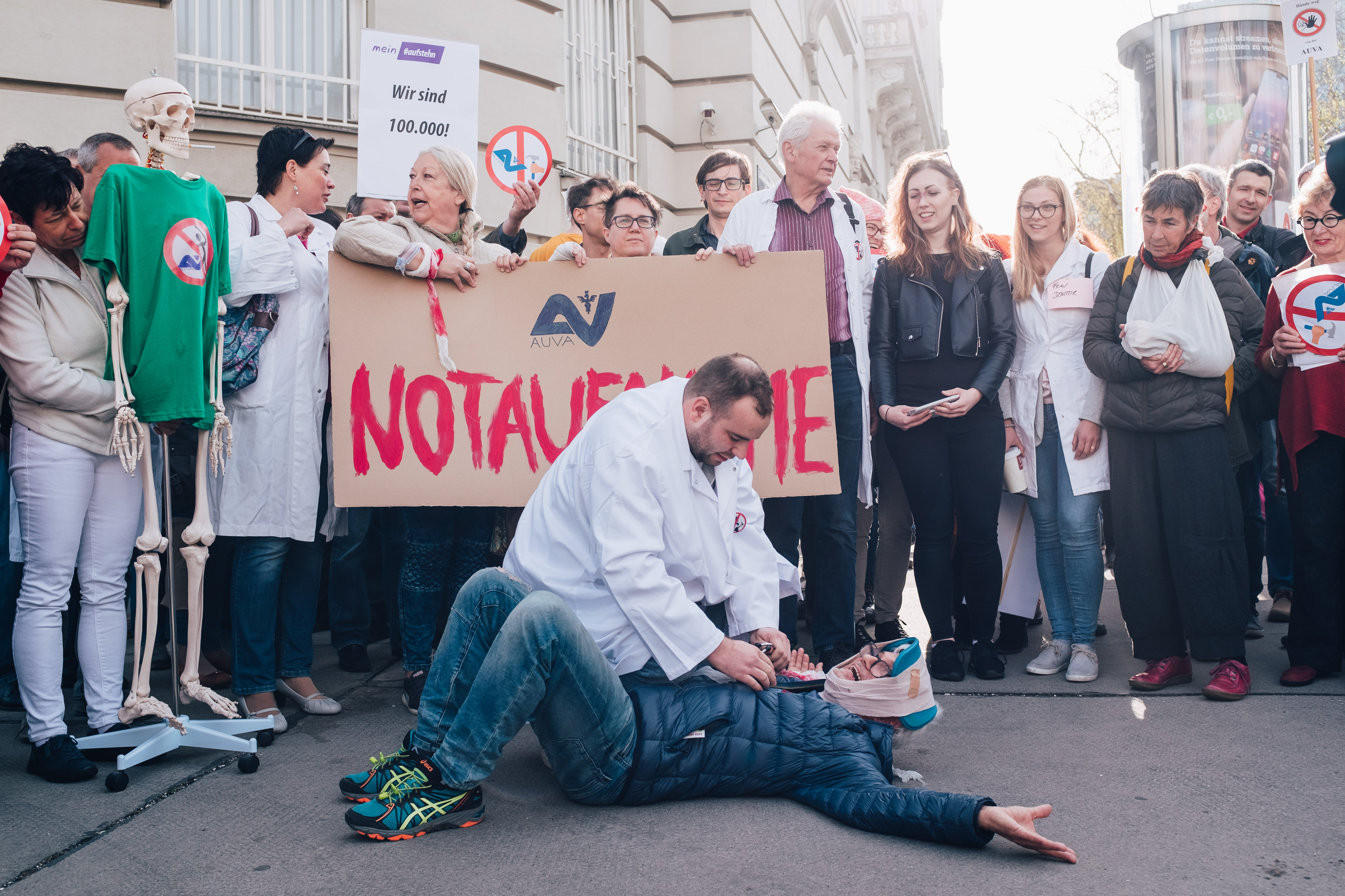 Flashmob gegen die Zerschlagung der Unfallversicherungsanstalt vor dem Gesundheitsministerium 2018